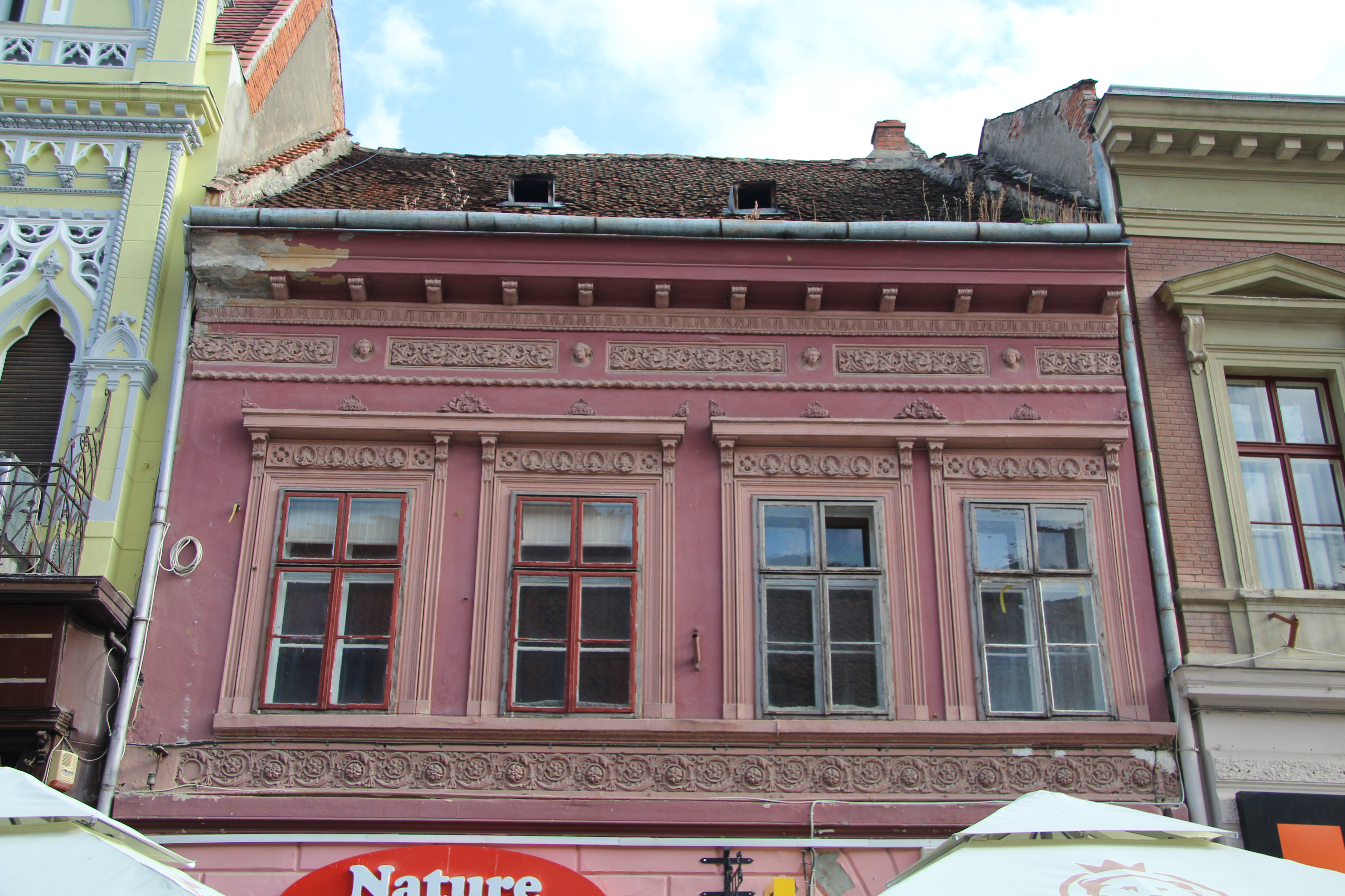 Eine der vielen interessanten Fassaden in Brasov (Kronstadt), Siebenbürgen, Rumänien